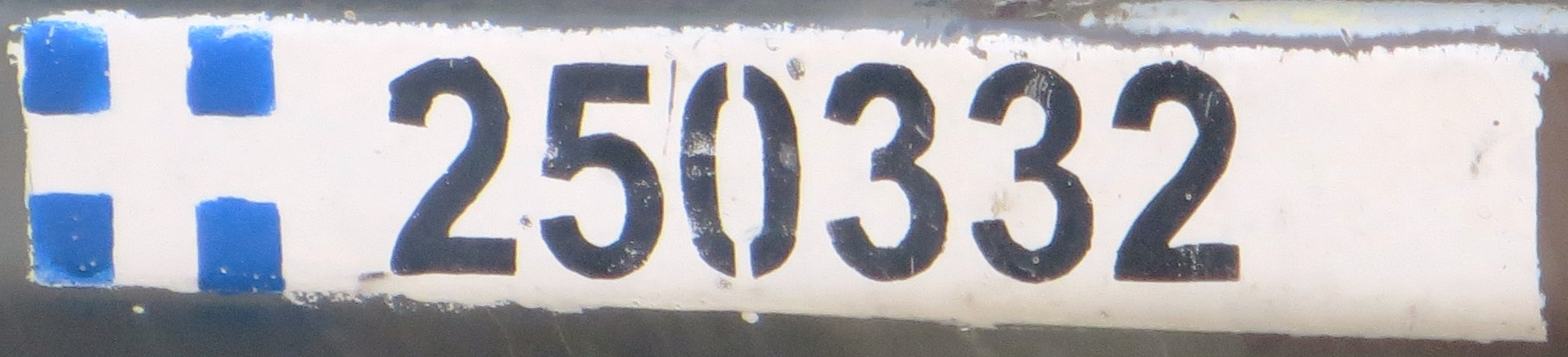 Militair kentekenplaat Griekenland